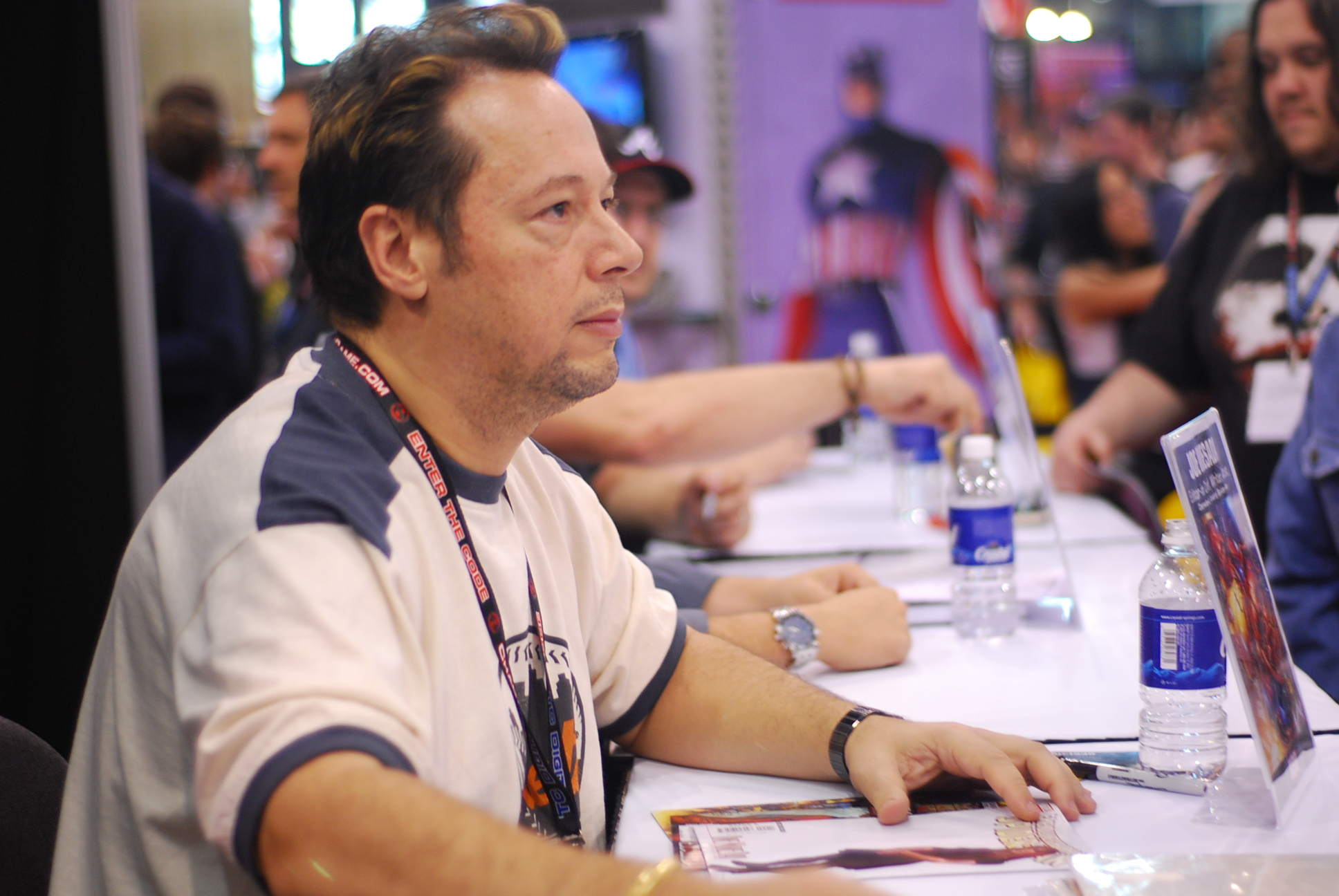 Joe Quesada at Comic-Con NYC 2008